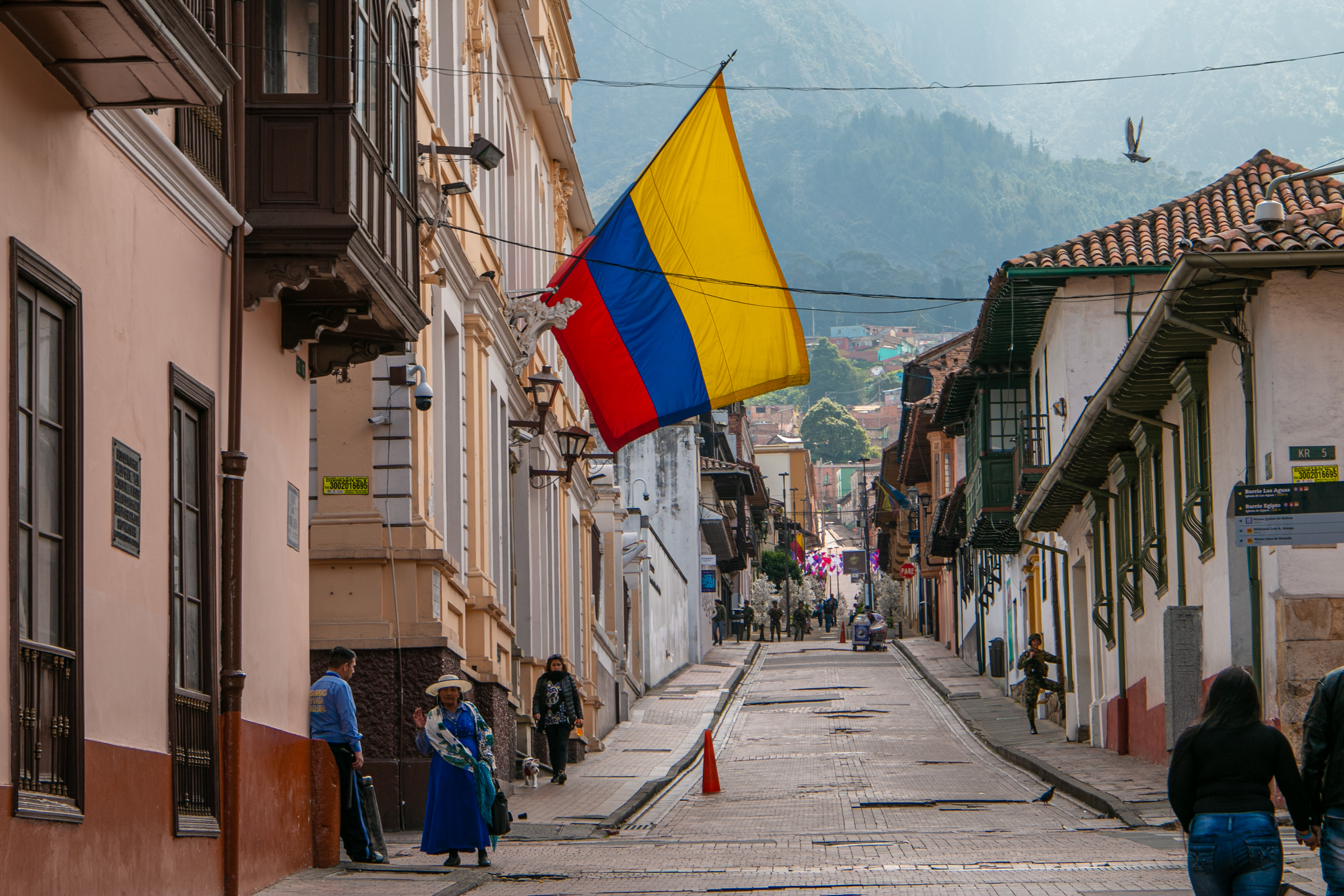 Vista de calles del barrio histórico de La Candelaria, Bogotá, Colombia